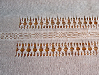 Indragen mönsterbård i karelsk spets. Se även detalj här